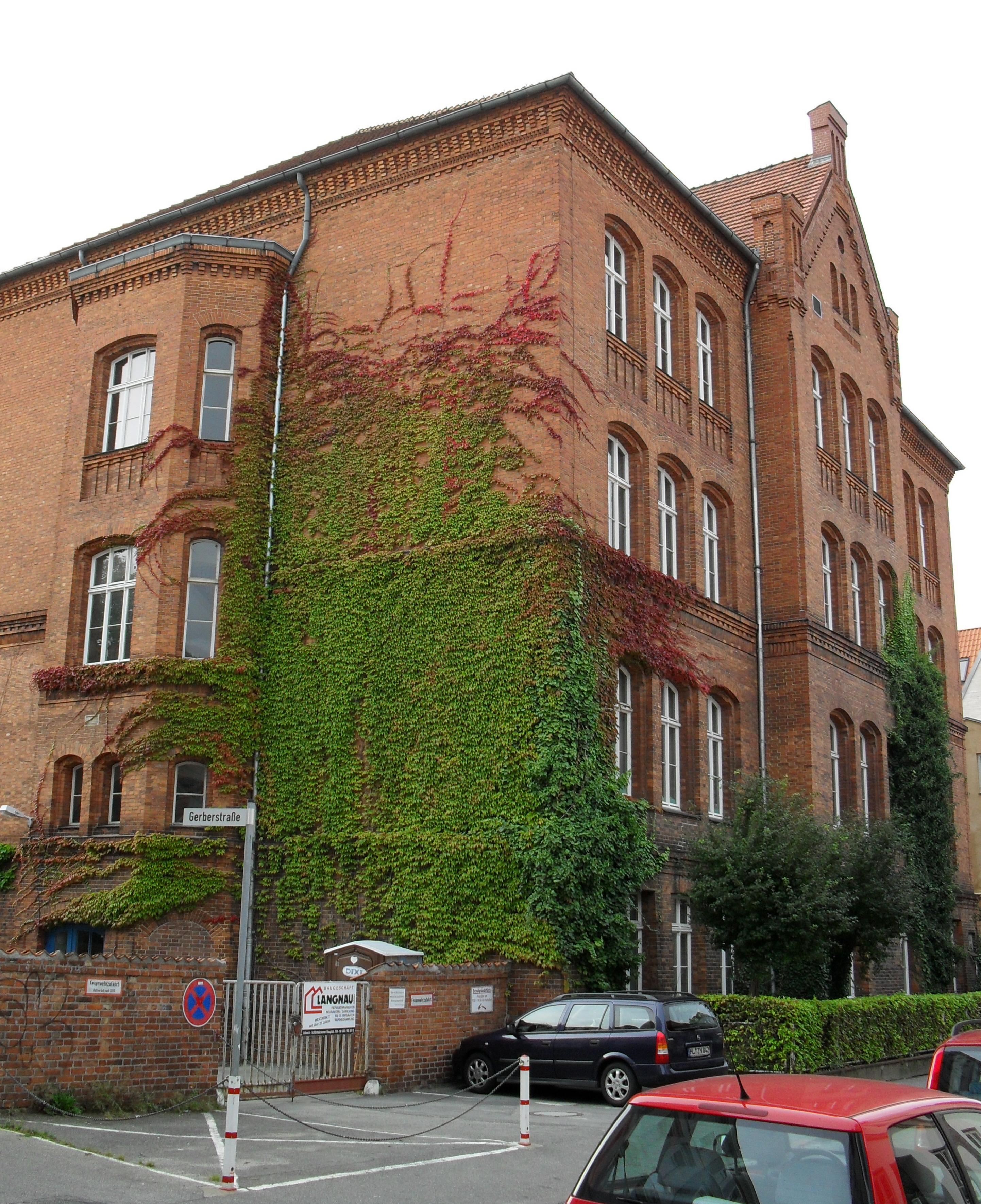 Die Marien-Schule im Langen Lohberg in Lübeck